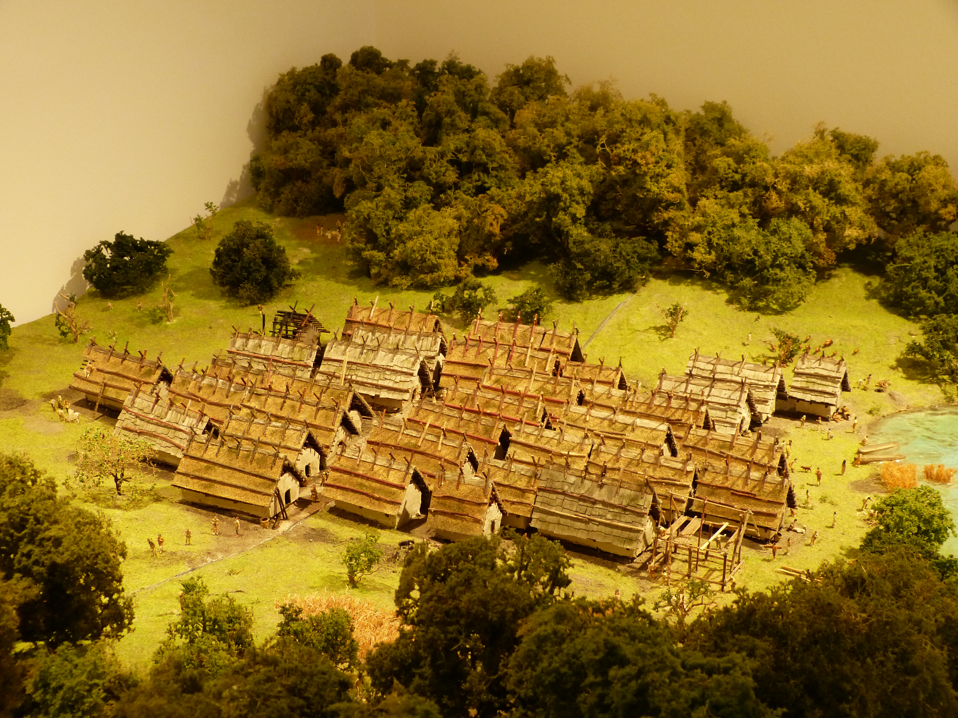 Breitenloo (prähistorische Seeufersiedlung) Siedlungsmodell von Christoph Müller, Amt für Archäologie TG